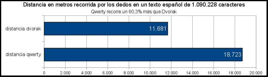 Distancia recorrida por los dedos al teclear un texto español mediante teclados QWERTY y Dvorak